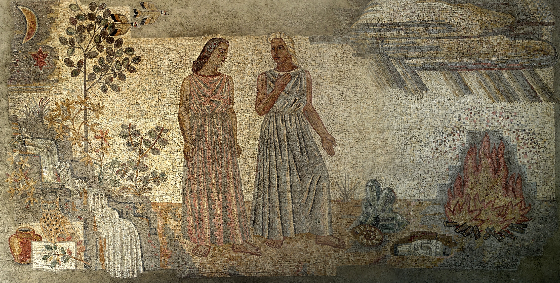 Walter Eglin (1895–1966): Mosaik Sendung, 1942–1948, 3,5 × 30 Meter, (Ausschnitt), beim Eingang des Kollegiengebäudes der Universität Basel